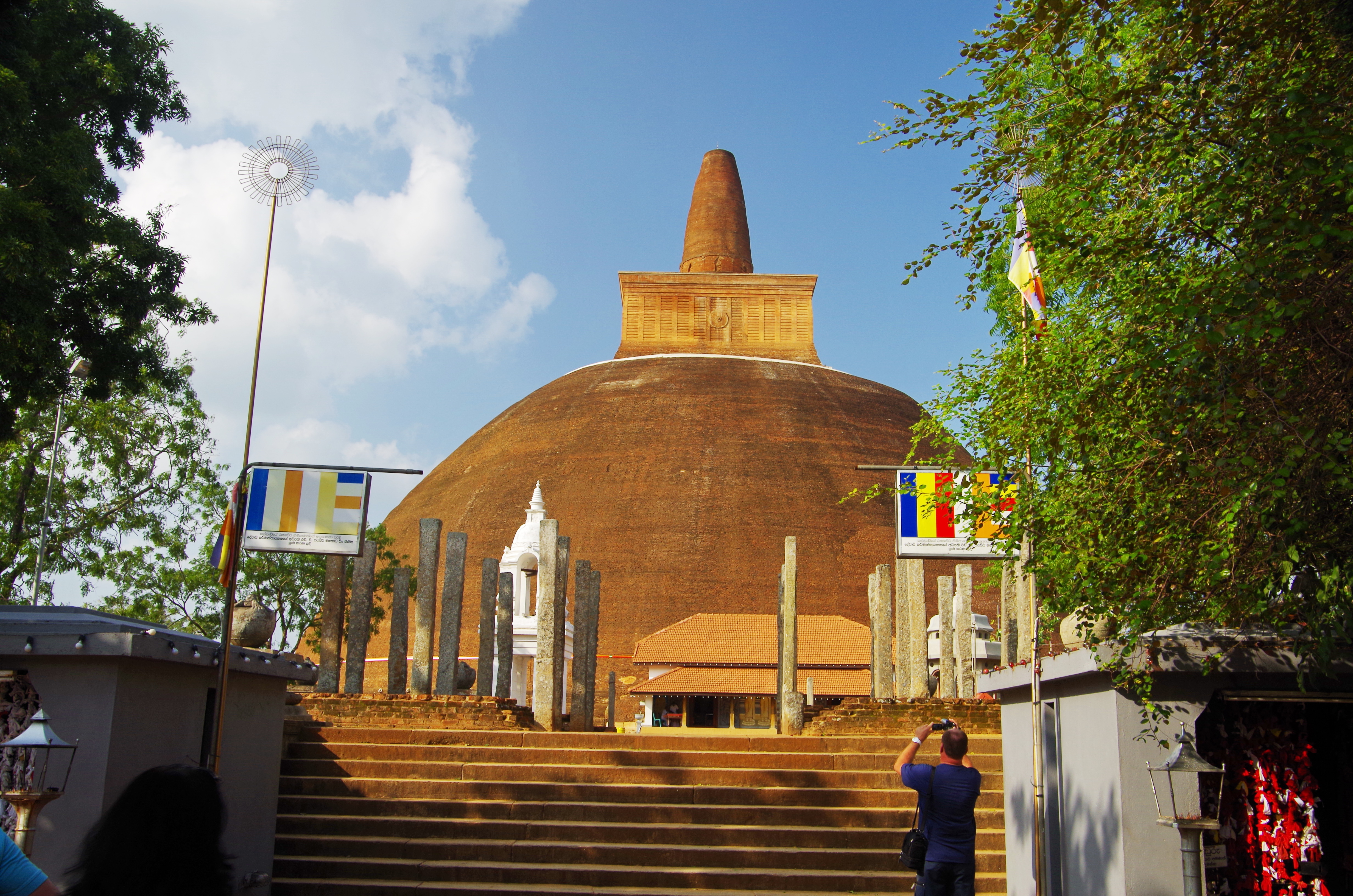 Abhagiriya Stupa